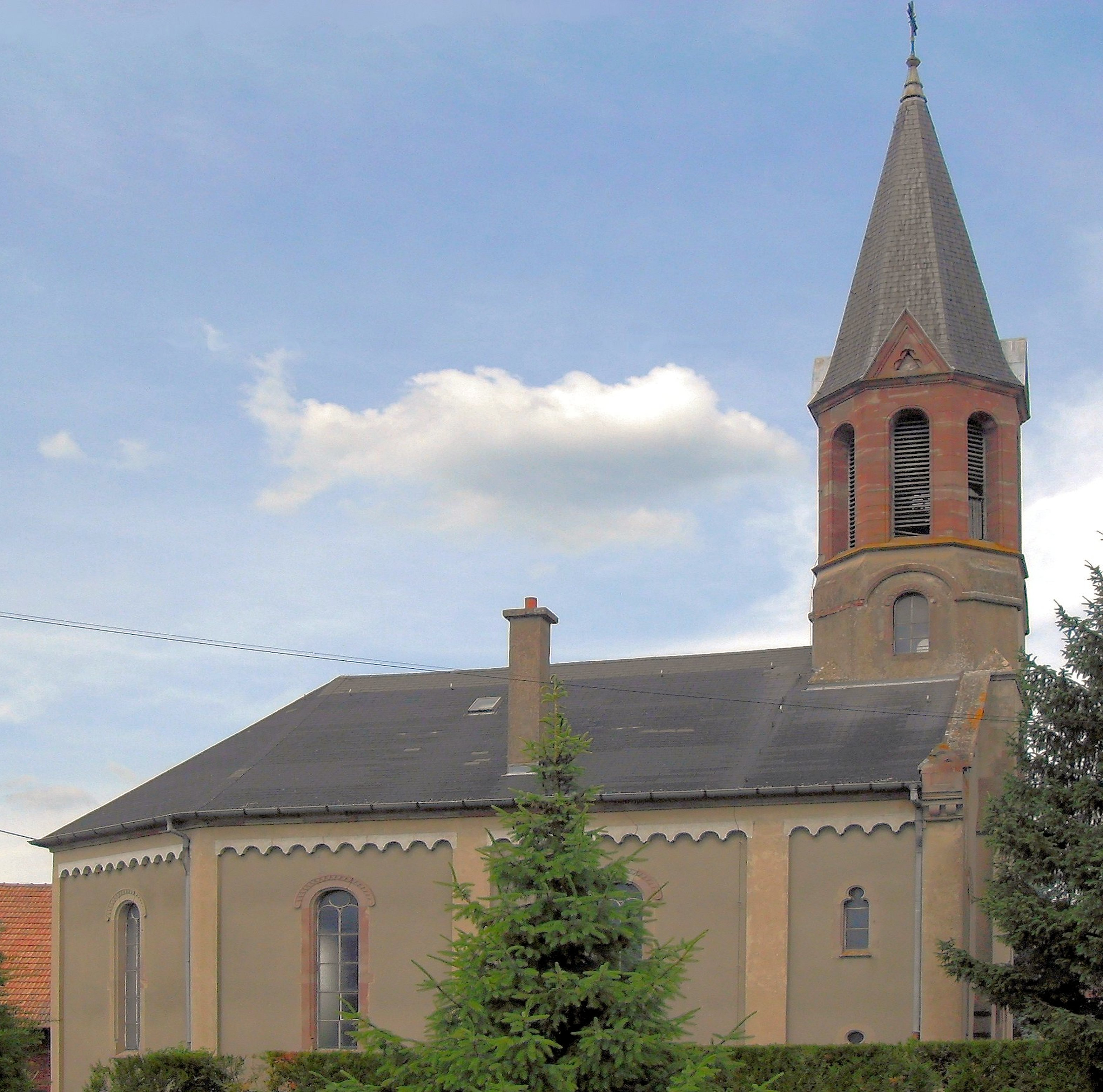 L'église protestante à Wolfgantzen